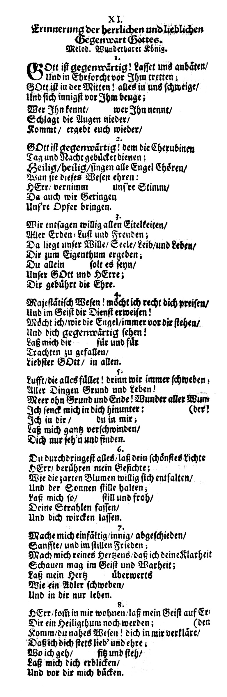 Gott ist gegenwärtig, Erstdruck in Gerhard Tersteegens Geistlichem Blumengärtlein inniger Seelen, Erstausgabe 1729